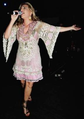 Selbst aufgenommen